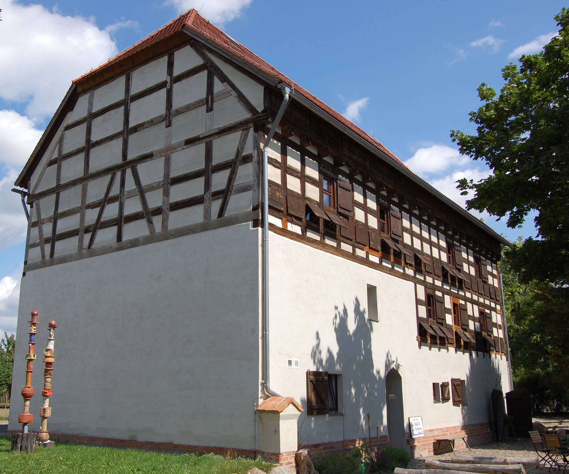 Kornspeicher am Schloss Straupitz